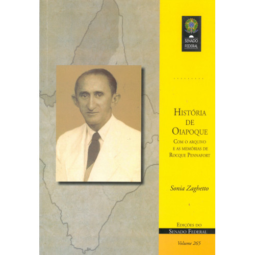 História de Oiapoque, publicação do Senado Federal, 2019.